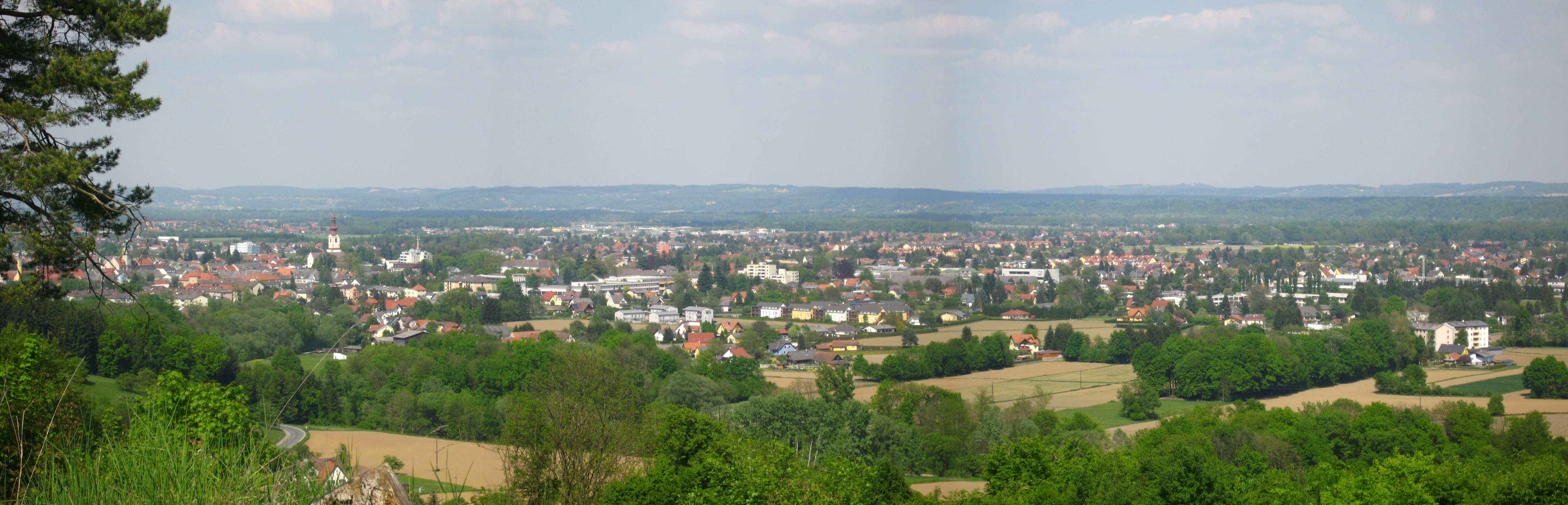 Panorama über die Stadt Leibnitz